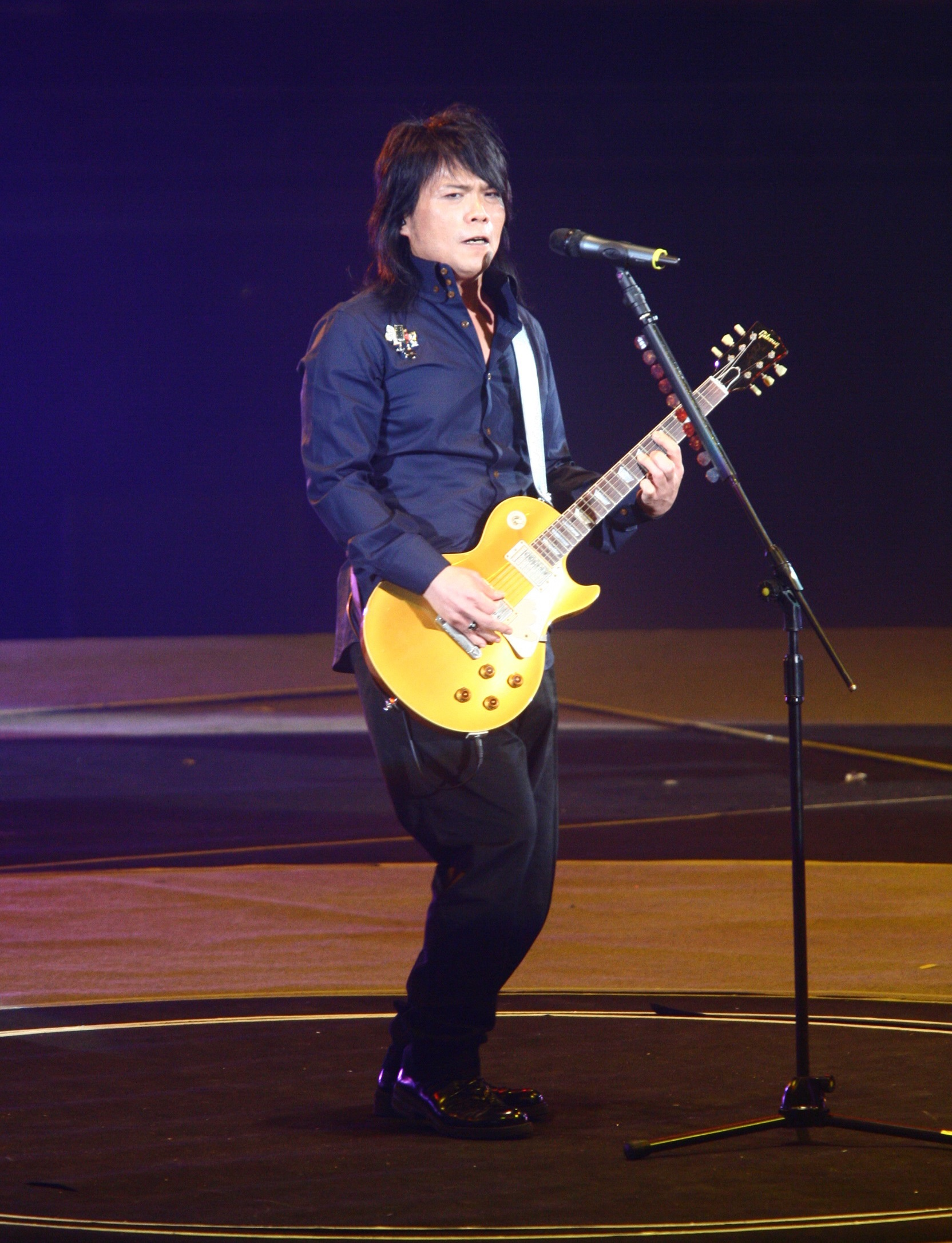 伍佰，本名吳俊霖（1968年1月14日－）